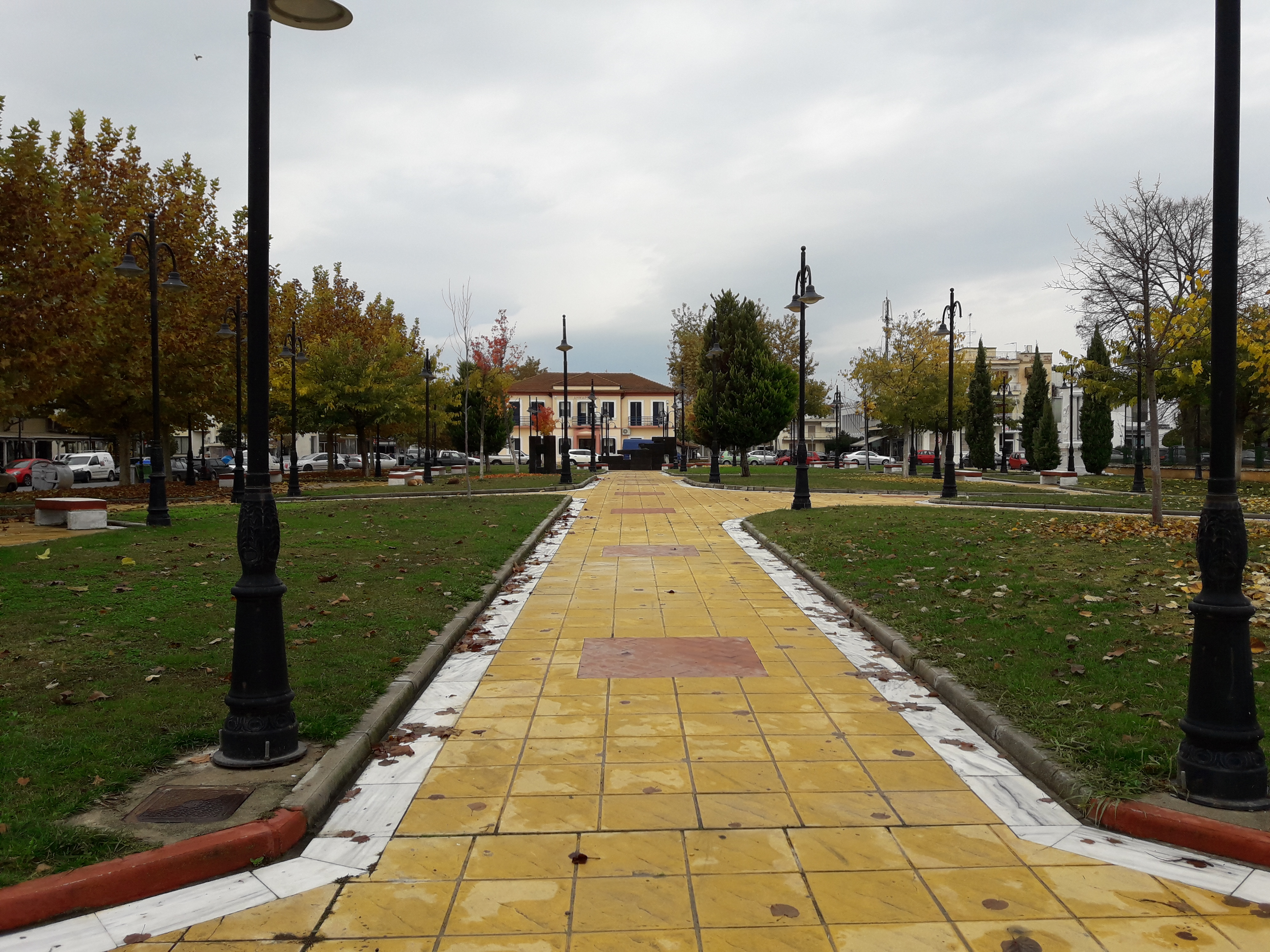 Πλατεία Ηράκλειας